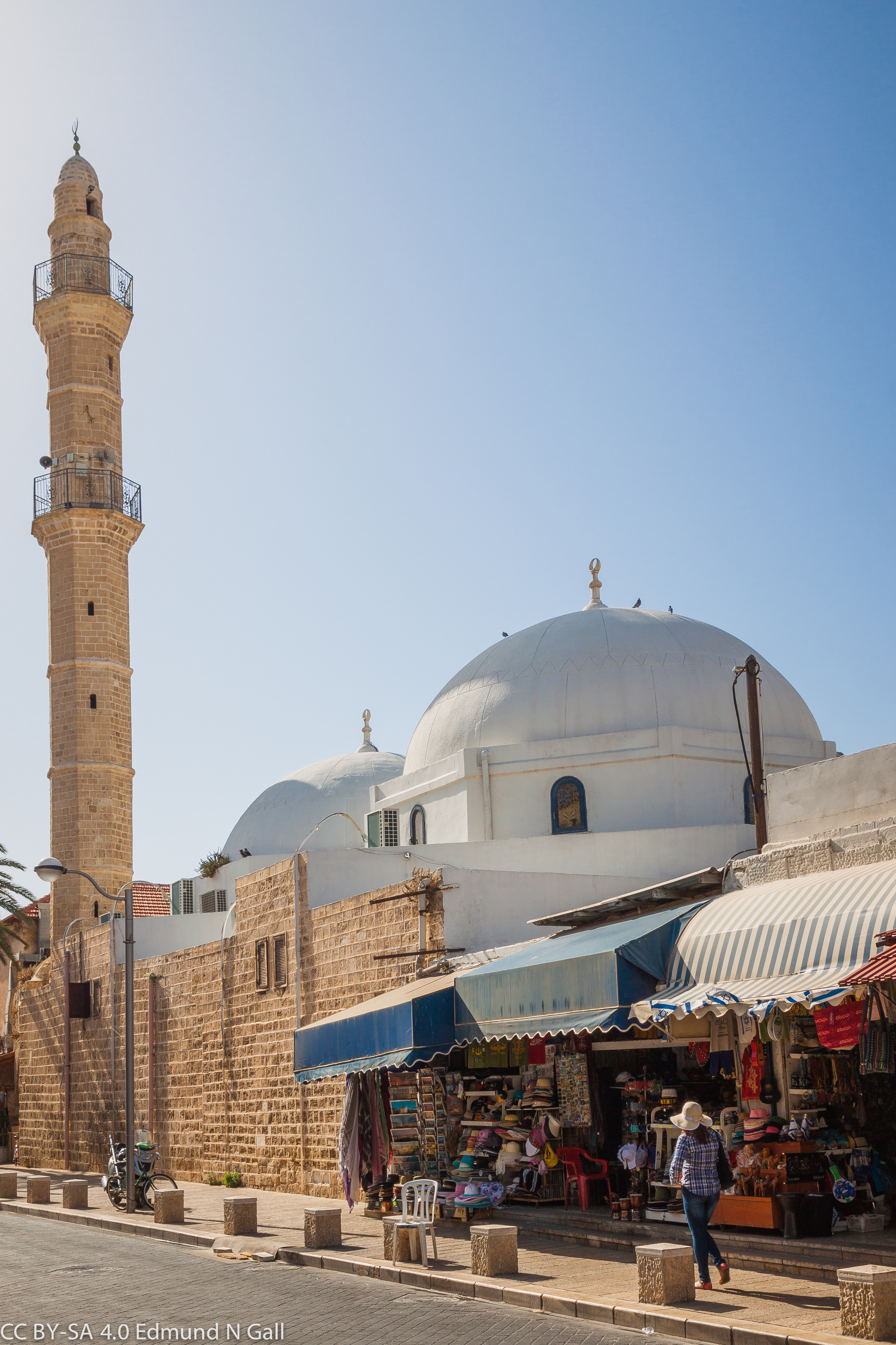 Mahmoudiya Mosque in Old Jaffa, Tel Aviv. — at Tel-Aviv.